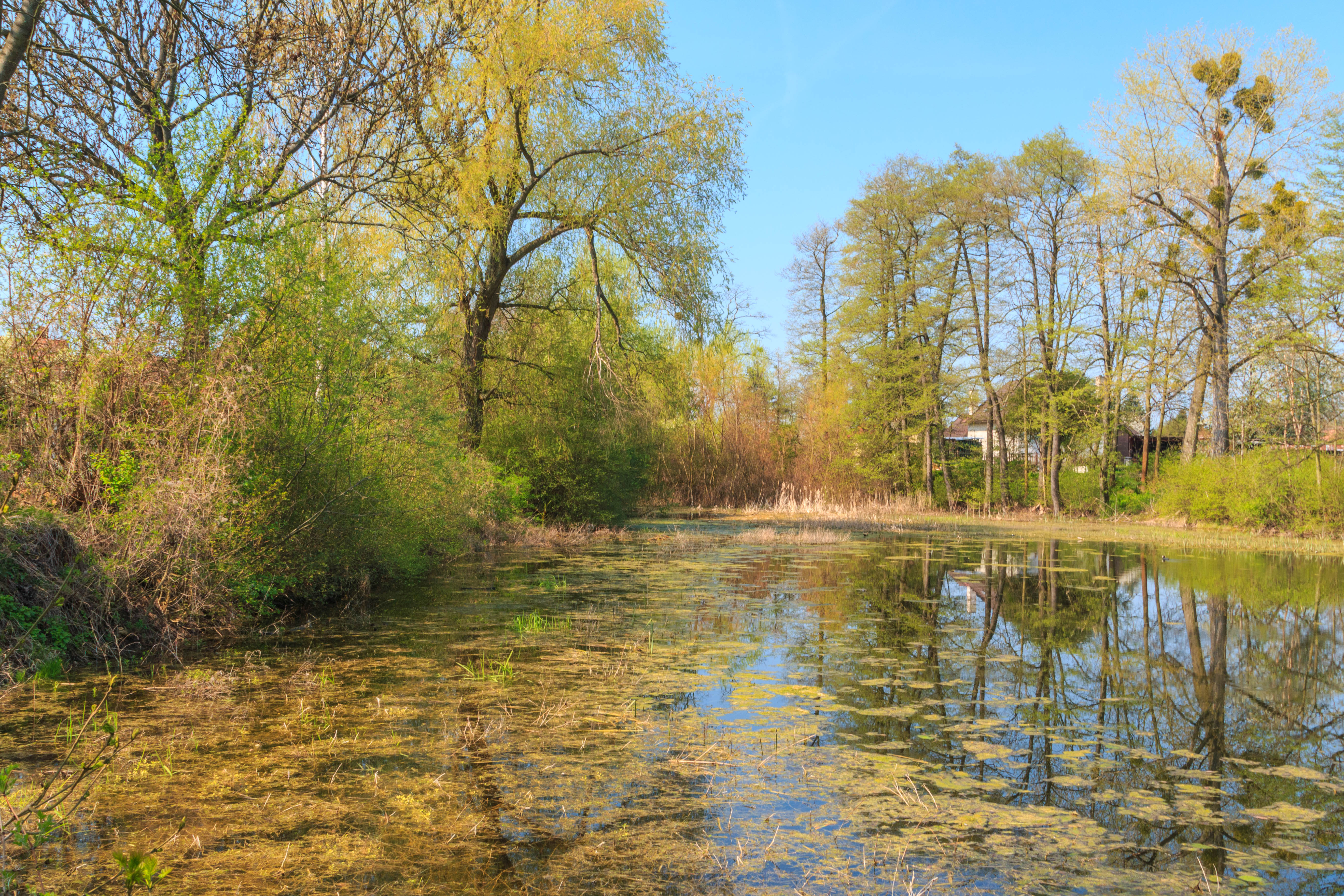 Rybníček Nad Marešákem v Cholticích Project: Vodstvo.